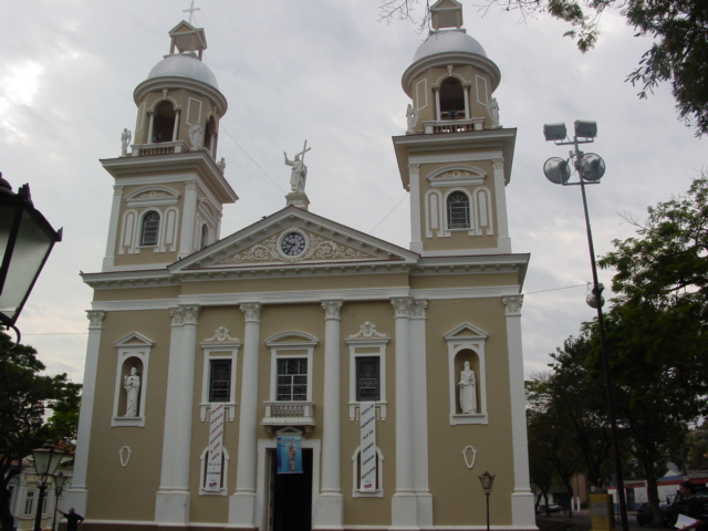 Catedral Nossa Senhora do Amparo Licensing Descrição: Catedral de Nossa Senhora do Amparo na cidade de Amparo(SP) Fonte: próprio autor Fotógrafo: Guilherme Bizelo de Assis